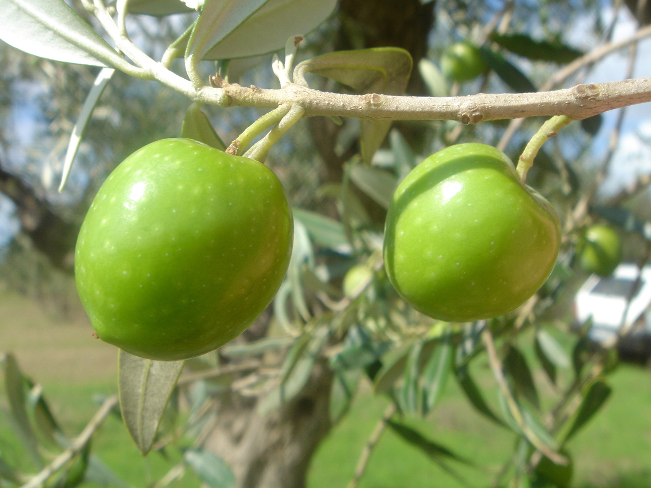 Nocellara del Belice - Italia.